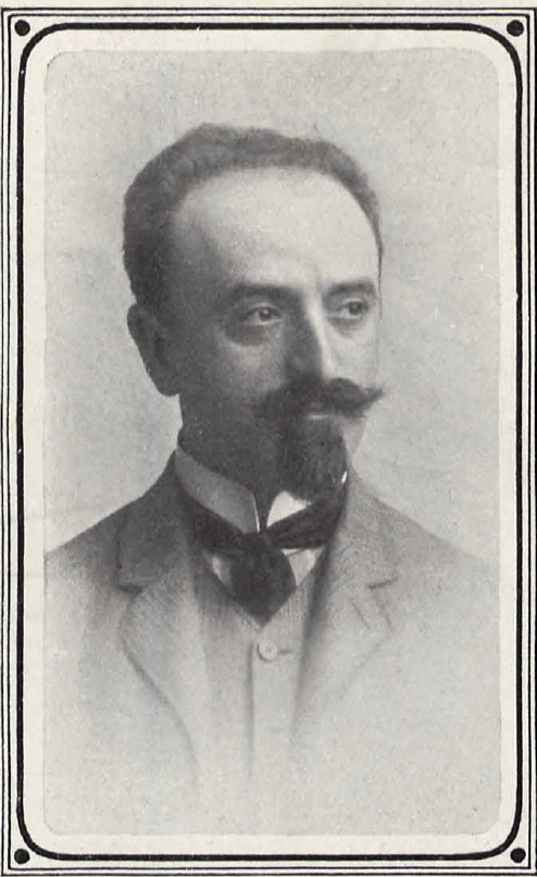 Norbert Falk (1872-1932), österreichisch-deutscher Journalist, Schriftsteller, Drehbuchautor.